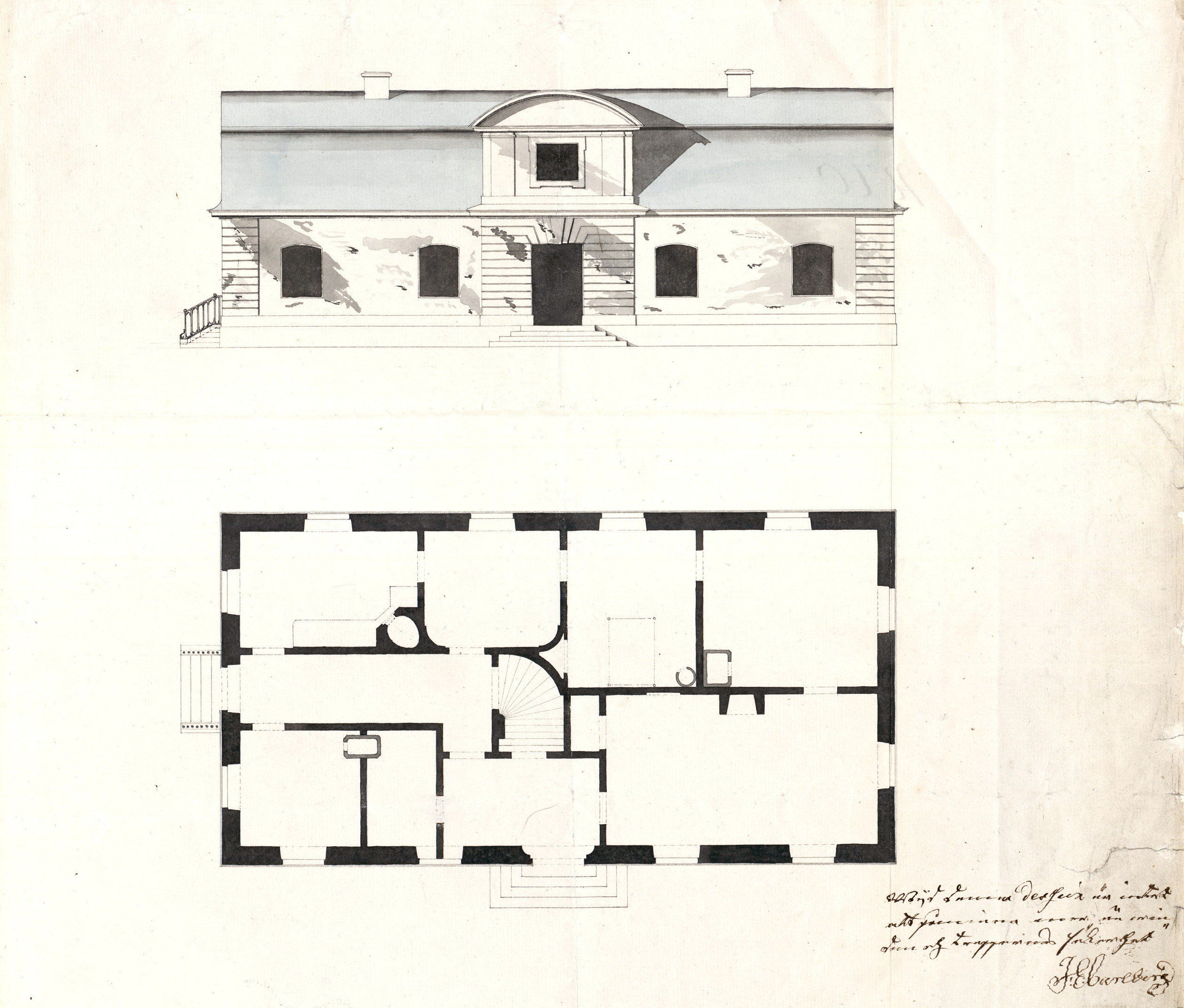 Paschs malmgård, södra fasaden med huvudentrén samt plan av bottenvåningen. Murmästare Pehr Westrells ritning 1757 till nybyggnad på Johan Paschs malmgård. Inlämnad till stadens ämbets- och byggningskollegium 5 april detta år och godkänd av stadsarkitekt Johan Eberhard Carlberg.